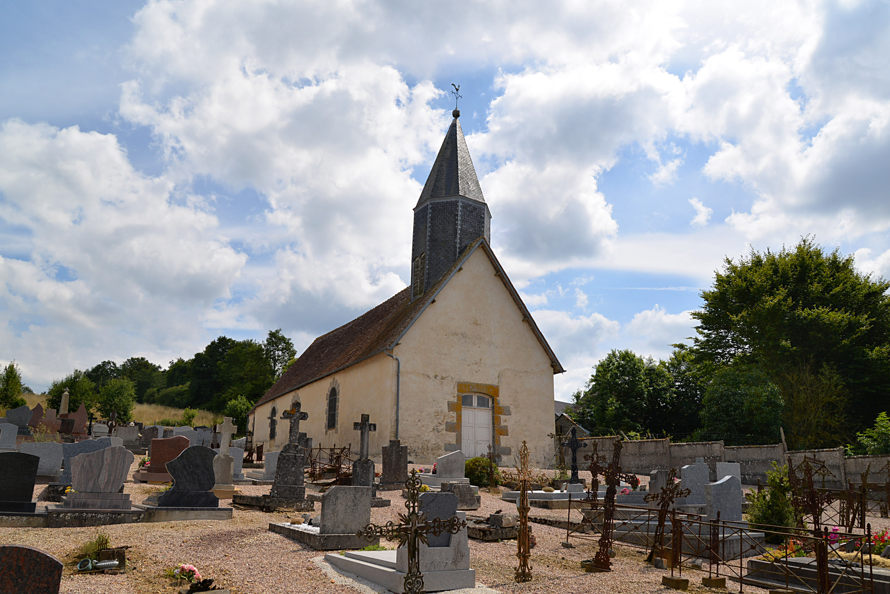 La Lande-de-Goult (Orne)